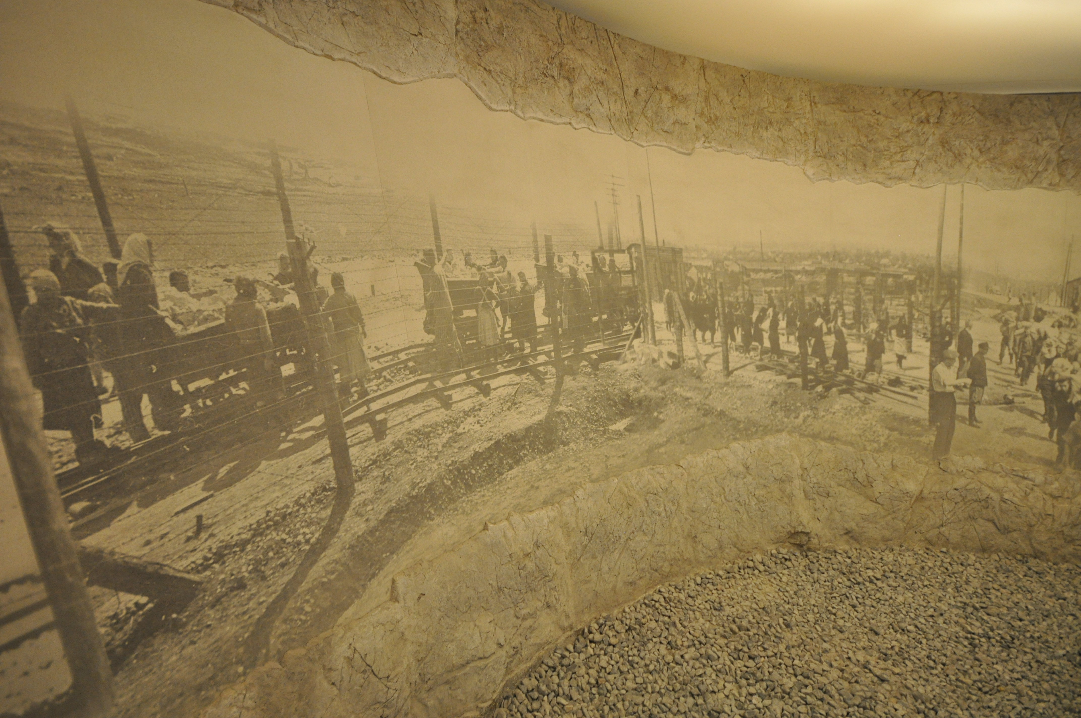 Oskar Schindler's Deutsche Emaillewaren-Fabrik (German Enamelware Factory)